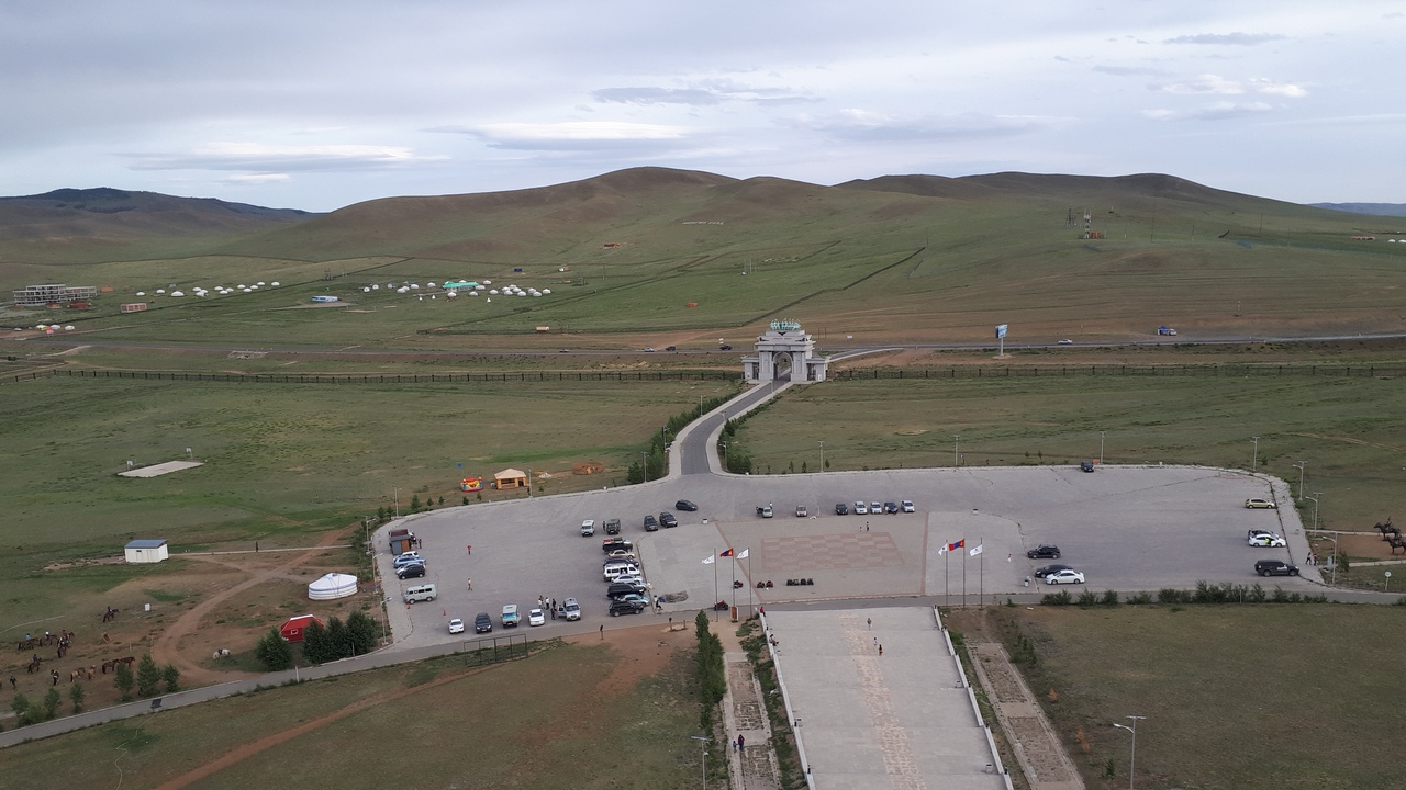 The main road leading to the statue of Genghis Khan